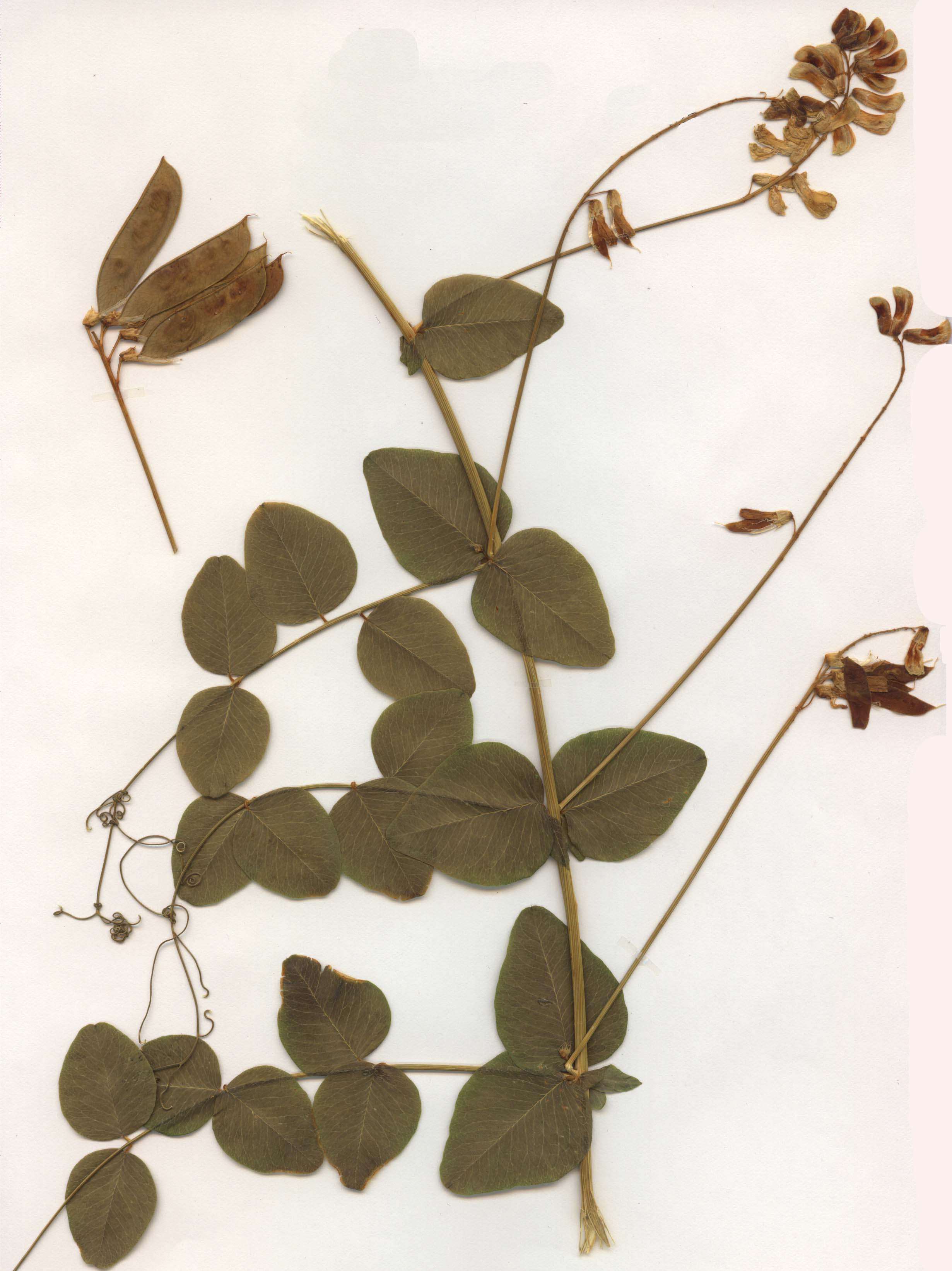 Vicia pisiformis, eigener Herbarbeleg